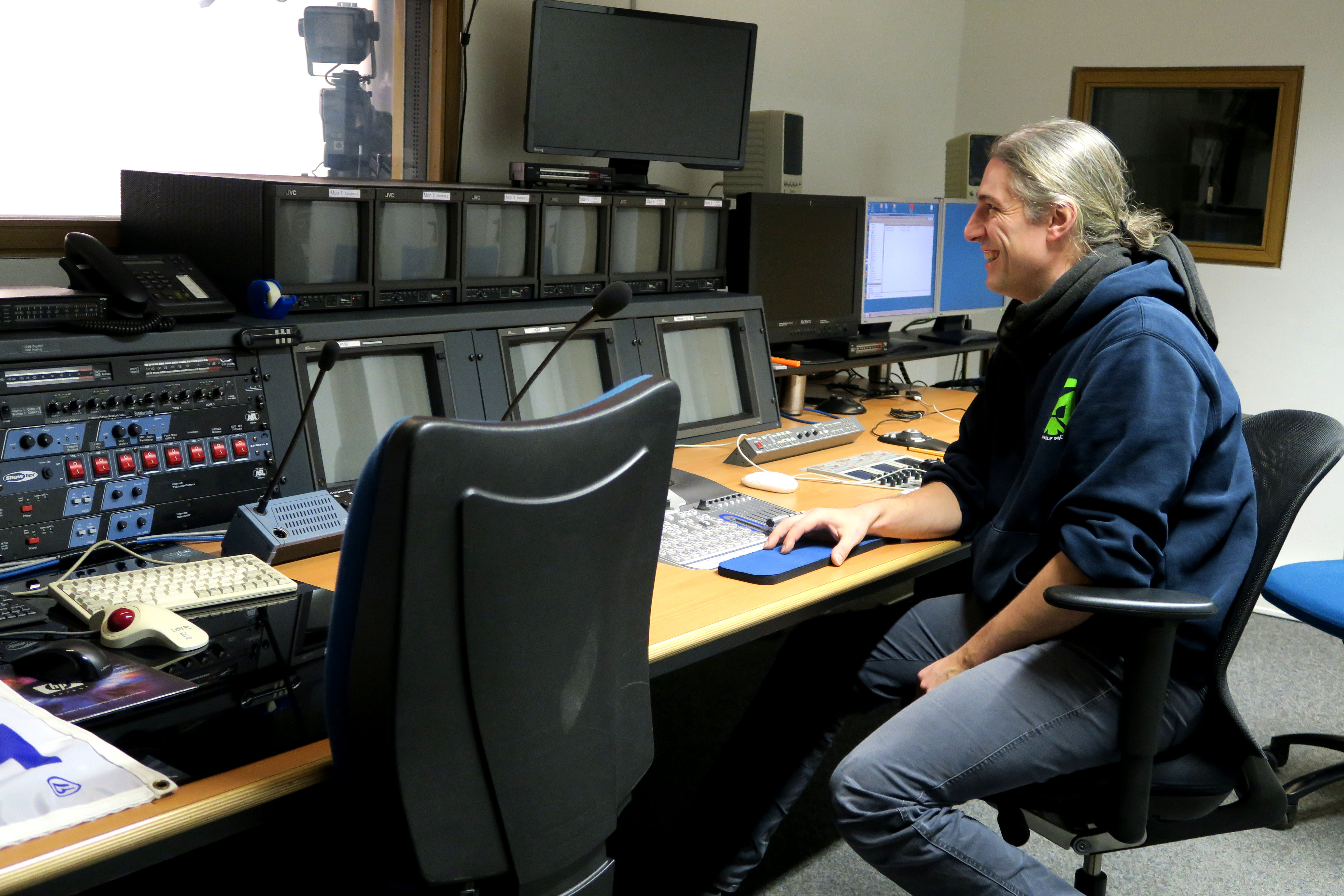 ifp-Studiochef Ingo Diekmann im Regieraum des Studios